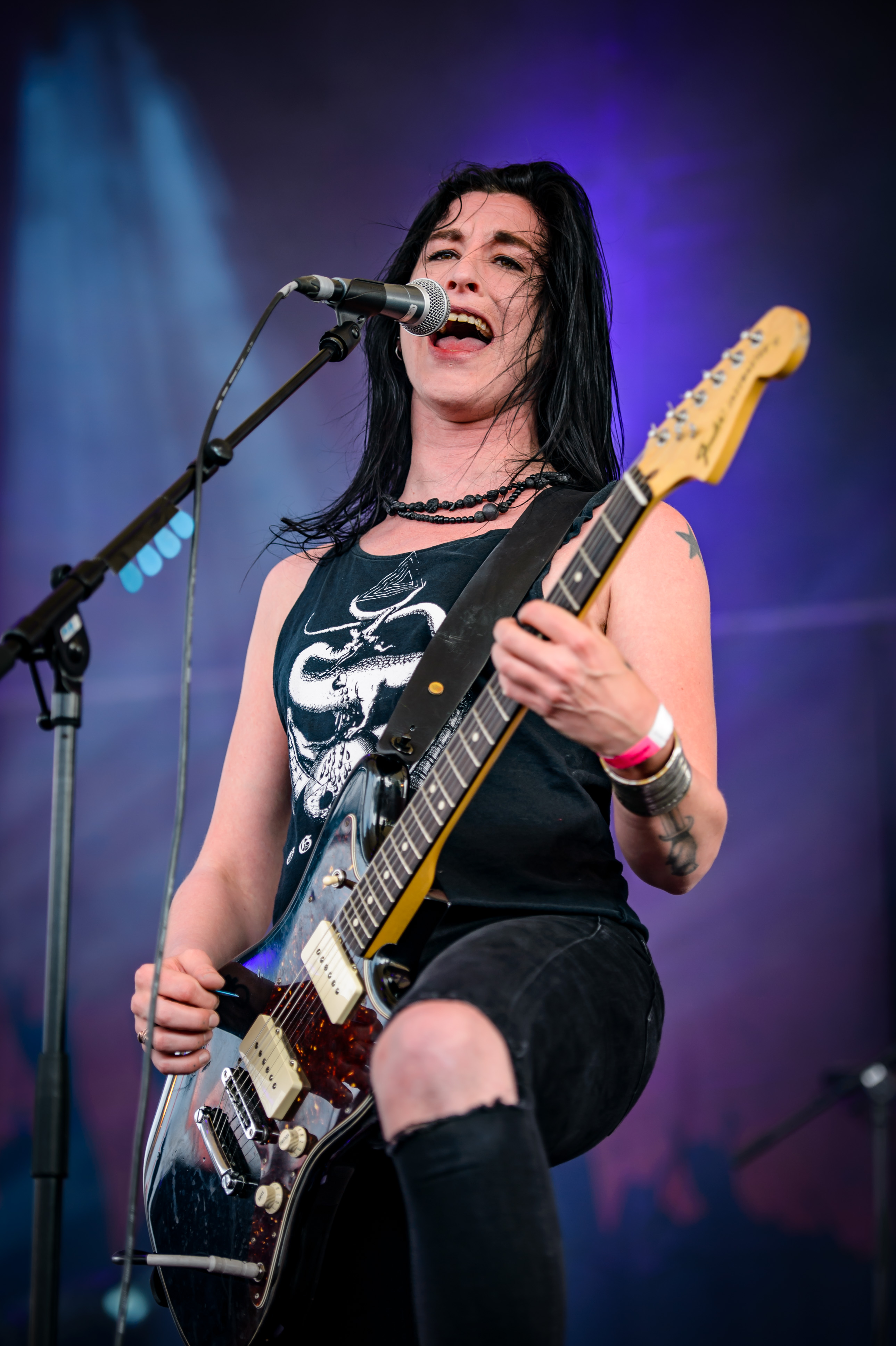 'Rock Hard Festival 2018; Amphitheater Gelsenkirchen': 'Dool'